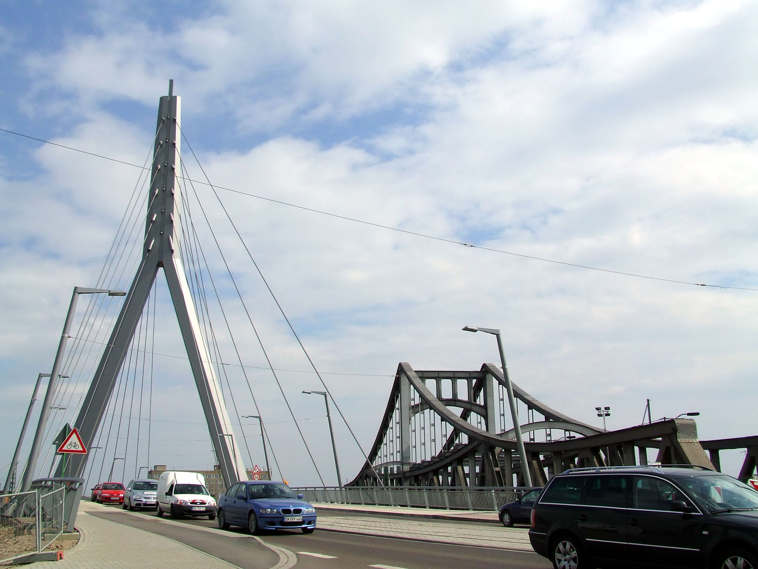 Die neu gebaute Berliner Brücke in Halle (Saale), Deutschland; daneben die Reste der historischen Brücke.